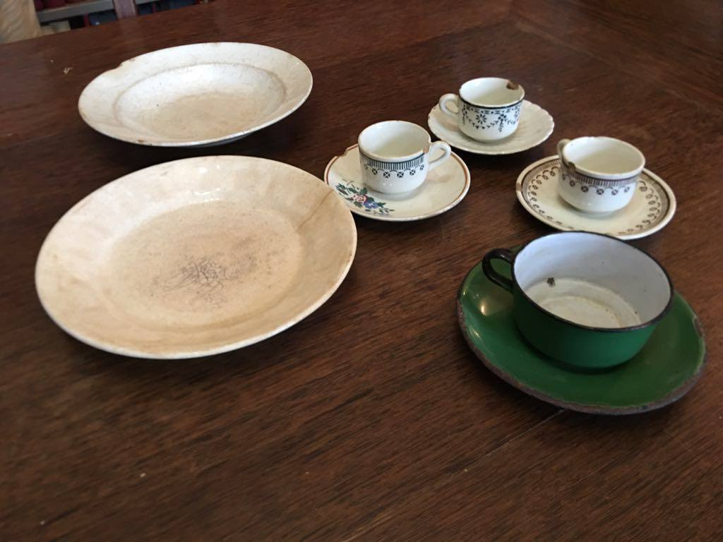 Pratos e xícaras pertencentes a Fernand e Magdeleine Jouteux (IHGT).